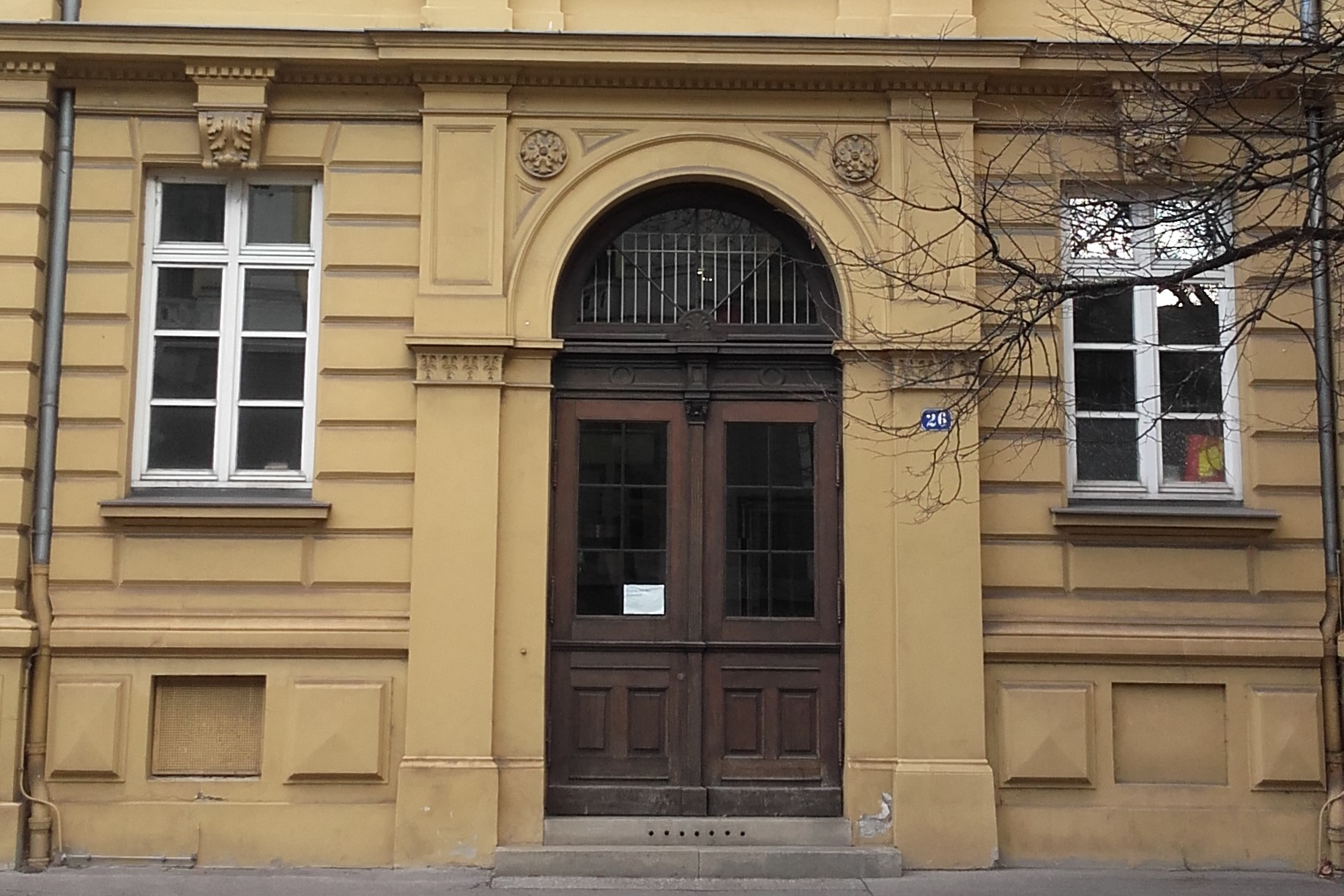 Ansicht ehem. Eingang St.-Anna-Grundschule Augsburg